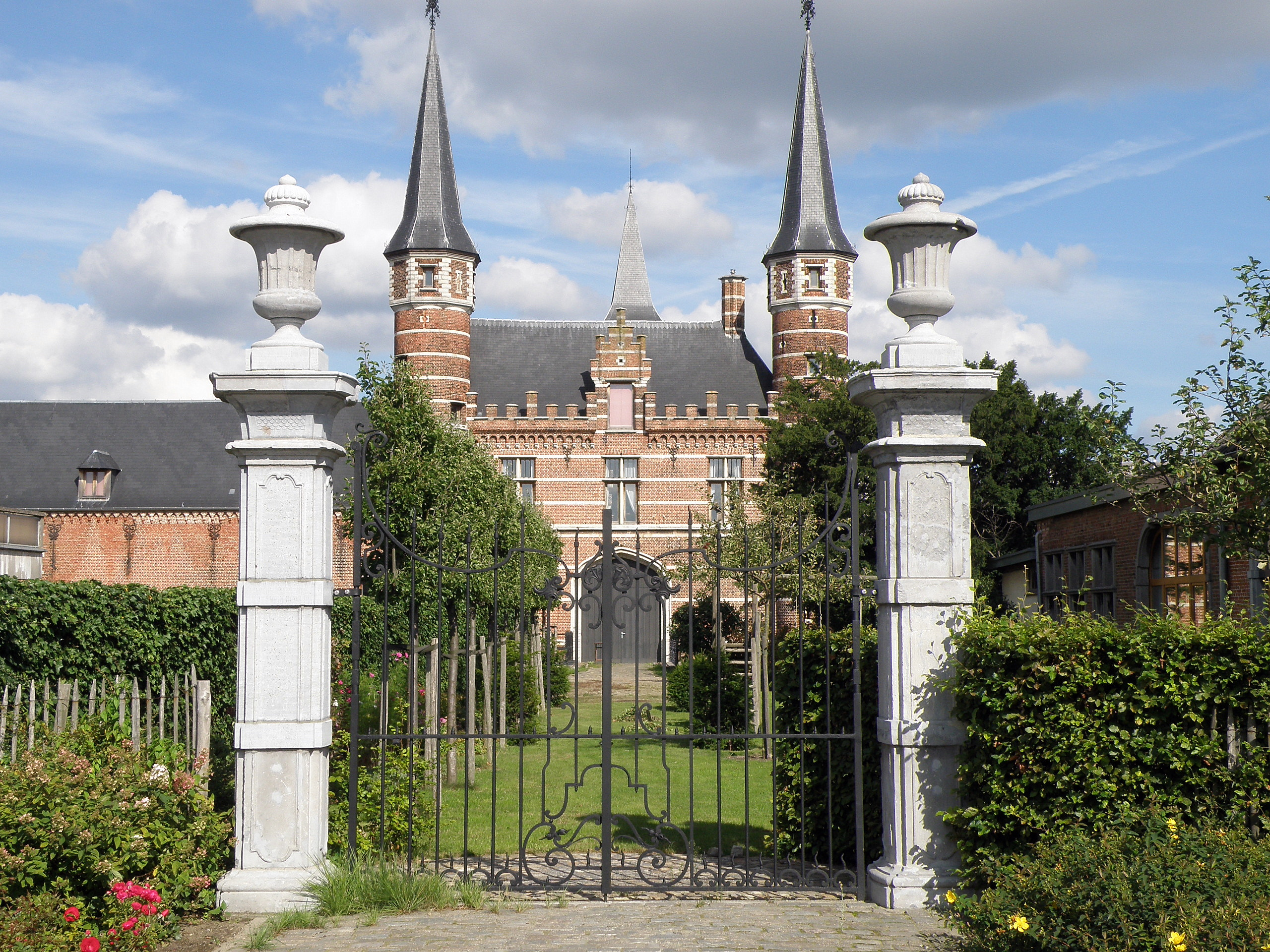 Anvers, Belgique. Château Te Couwelaer, appelé familièrement De Drie Torekens (les Trois Tourettes), sis au n° 202 de la Lakborslei à Deurne-Nord, dans la proche banlieue nord-est d’Anvers. Édifice remontant au XVe siècle, plusieurs fois remanié ensuite, mais dont l’aspect actuel résulte d’une tentative de « reconstitution » de son aspect du XVIIe (sur la foi d’un tableau de 1625) entreprise par l’archit. Joseph Schadde vers 1850. Portail d’entrée rococo sur la Lakborslei et façade ouest.